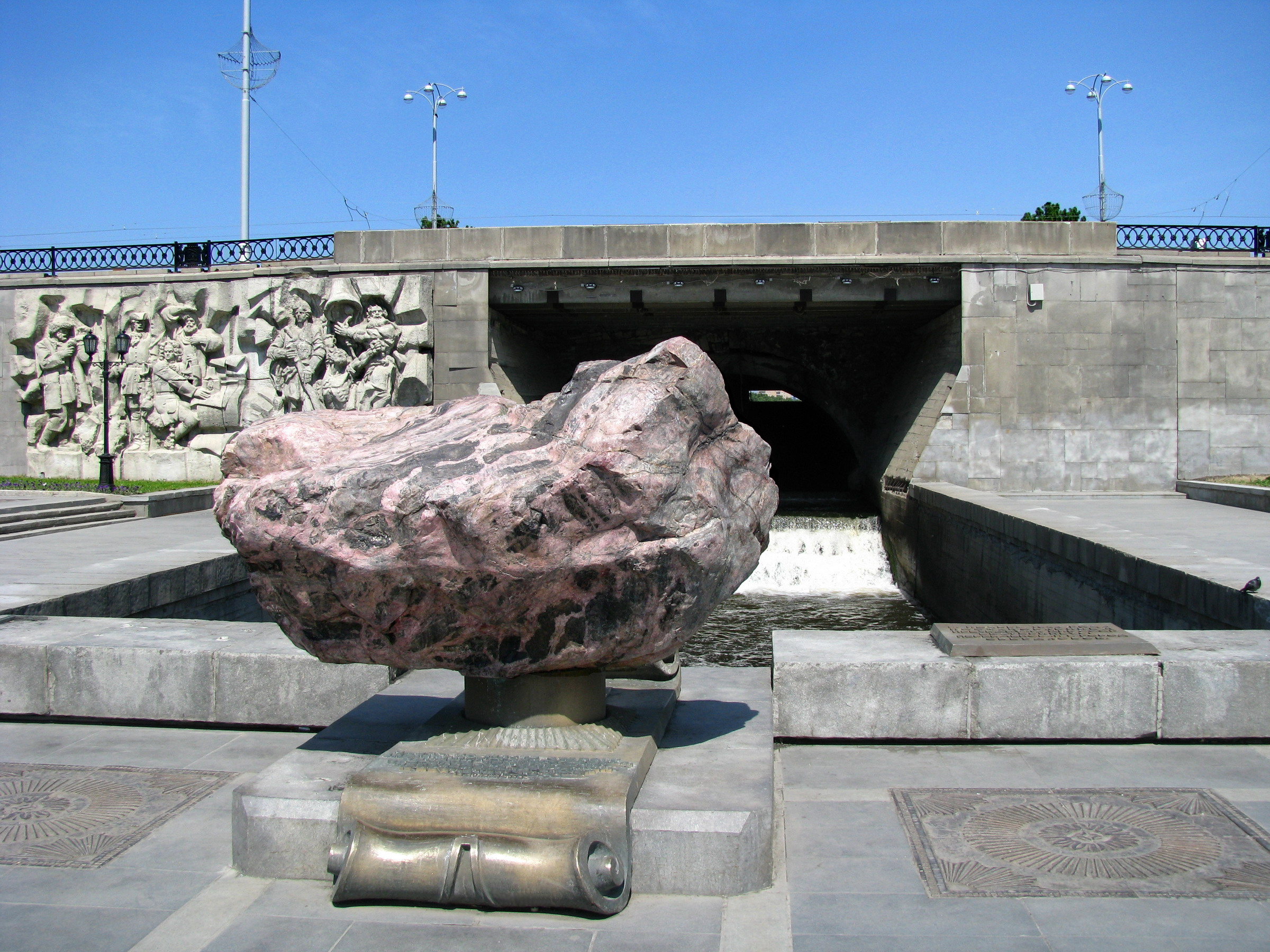 Плотина Городского пруда в Екатеринбурге - исторический "центр" города.